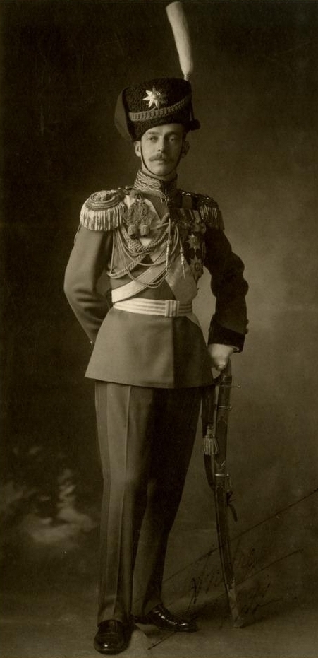 Великий князь Андрей Владимирович в начале 1910-х годов.